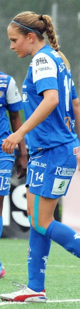 a_135_4328